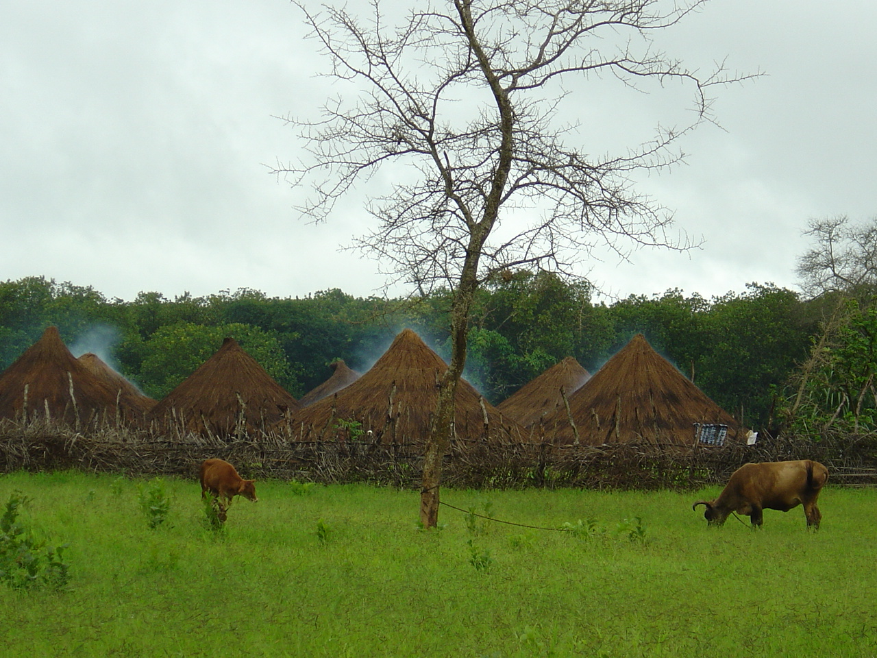 Villaggio nella savana - Bula - Guinea-Bissau